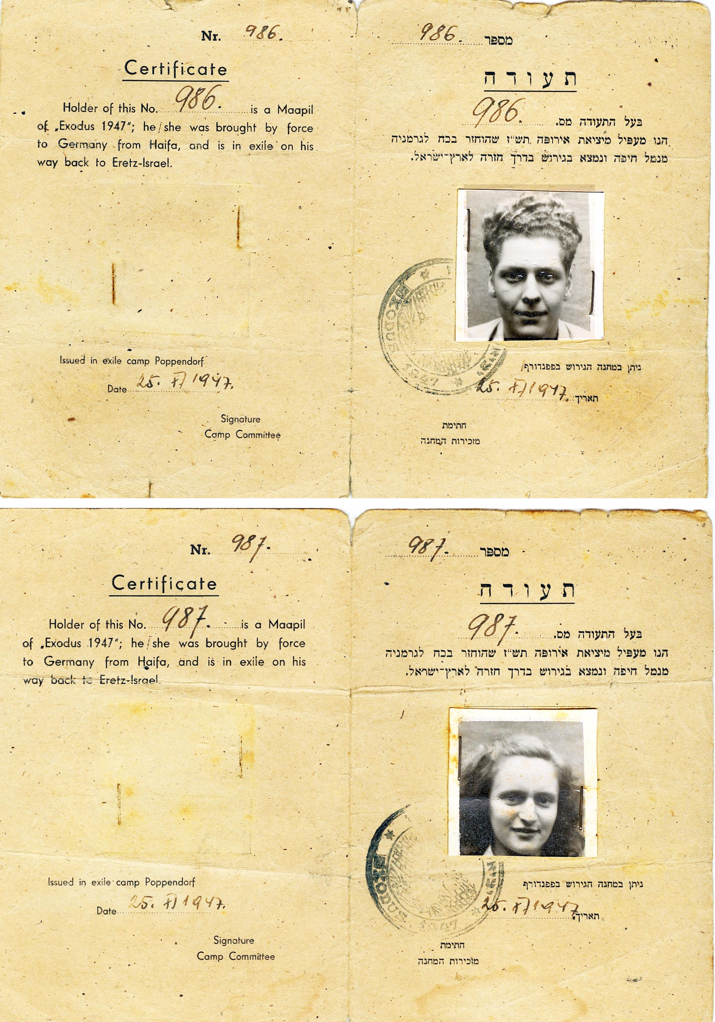 תעודות מעפיל שנתנו במחנה פופנדורף